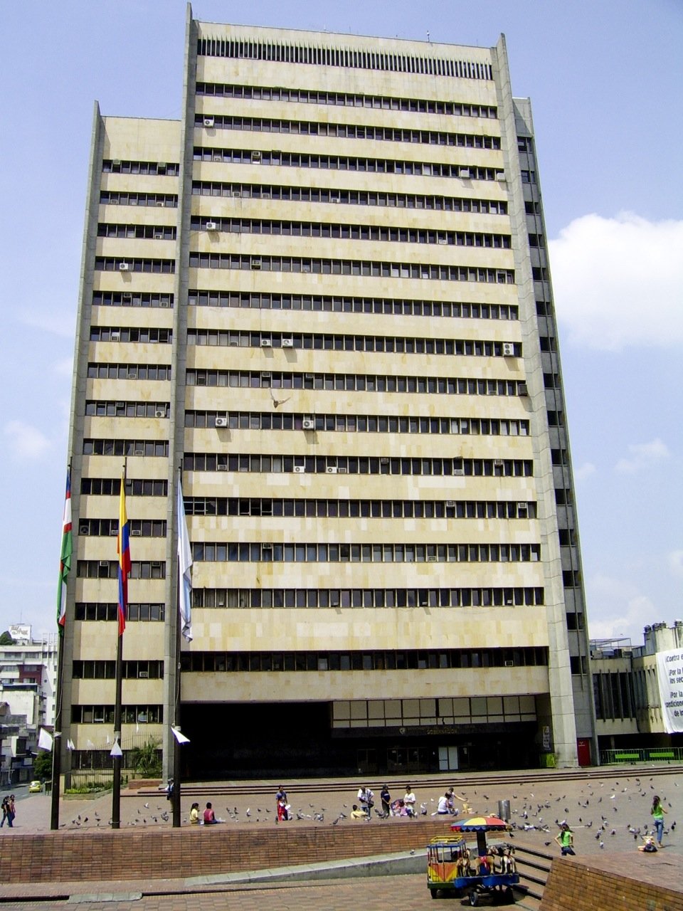 Edificio Gobernacion Valle del Cauca, Palacio de San Francisco